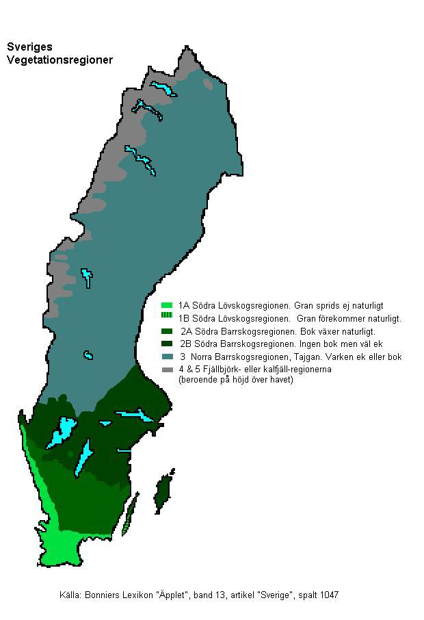 Sveriges vegitationsregioner (the vegetation regions in Sweden)